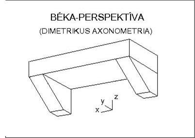 Konzol axonometrikus alulnézetben